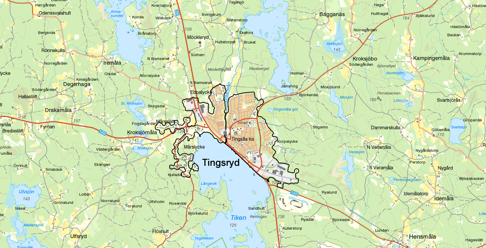 Tätorten Tingsryd med gränserna från Statistiska centralbyråns tätortsavgränsning 2015 i svart. Bakgrundskarta från Lantmäteriet, skala 1:30 236.